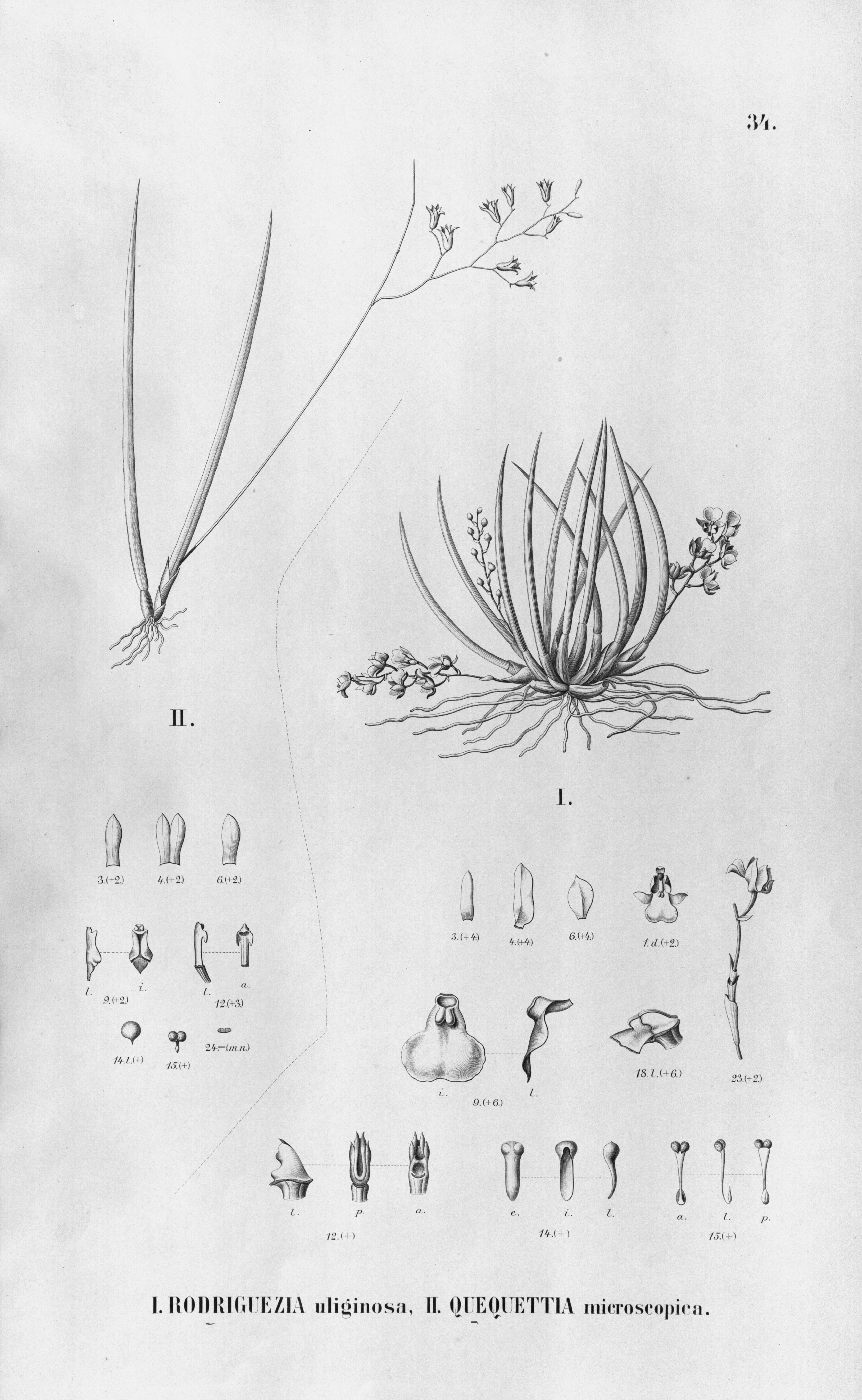 Illustration of I. Capanemia superflua (as syn. Rodriguezia uliginosa) II. Quekettia microscopica (as syn. Quekettia microscopica, spelled Quequettia m.)